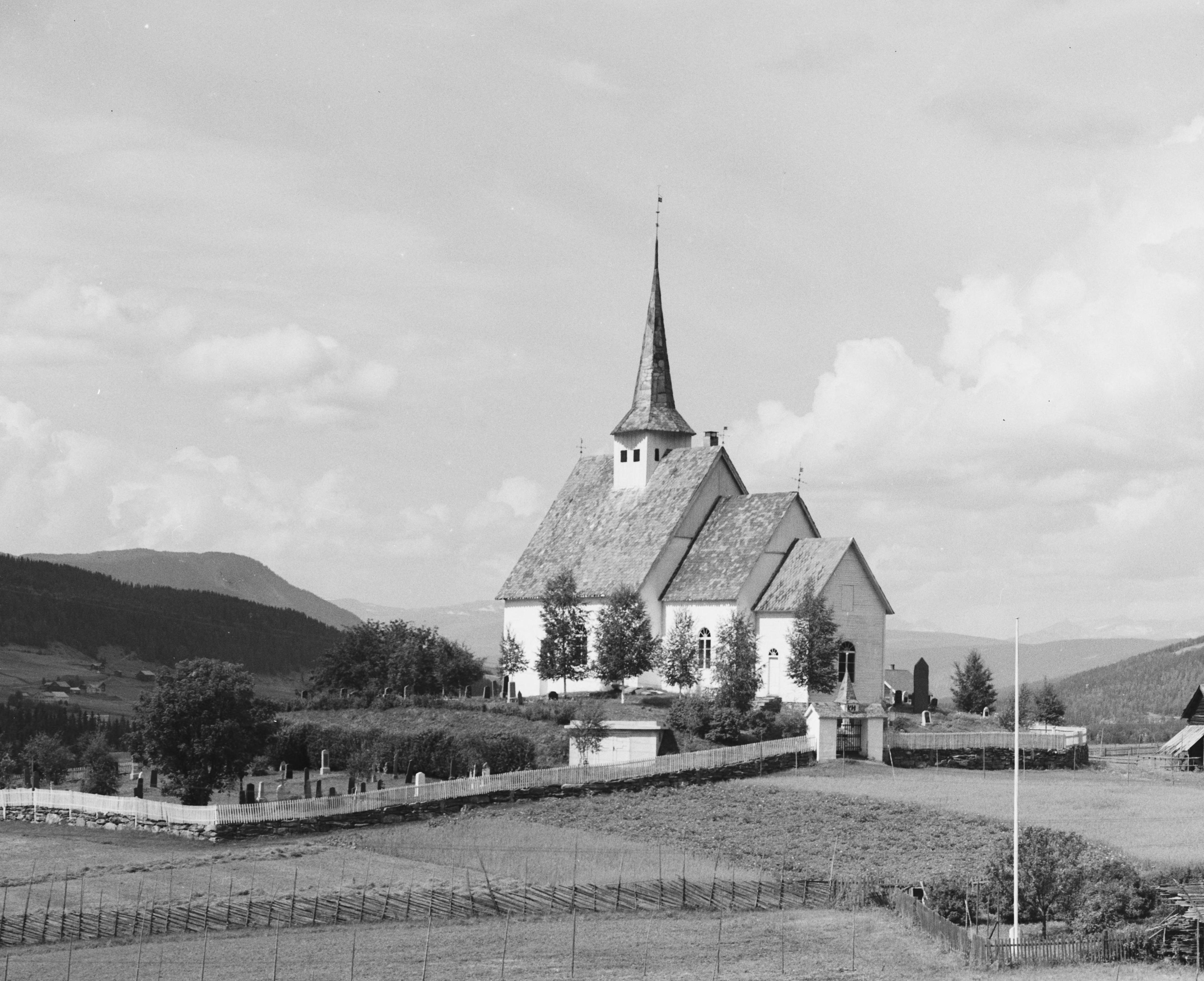 Bildet er hentet fra Nasjonalbibliotekets bildesamling. Anmerkninger til bildet var: Fotograf ukjent. Ulnes,Valdres, Nord-Aurdal, Oppland